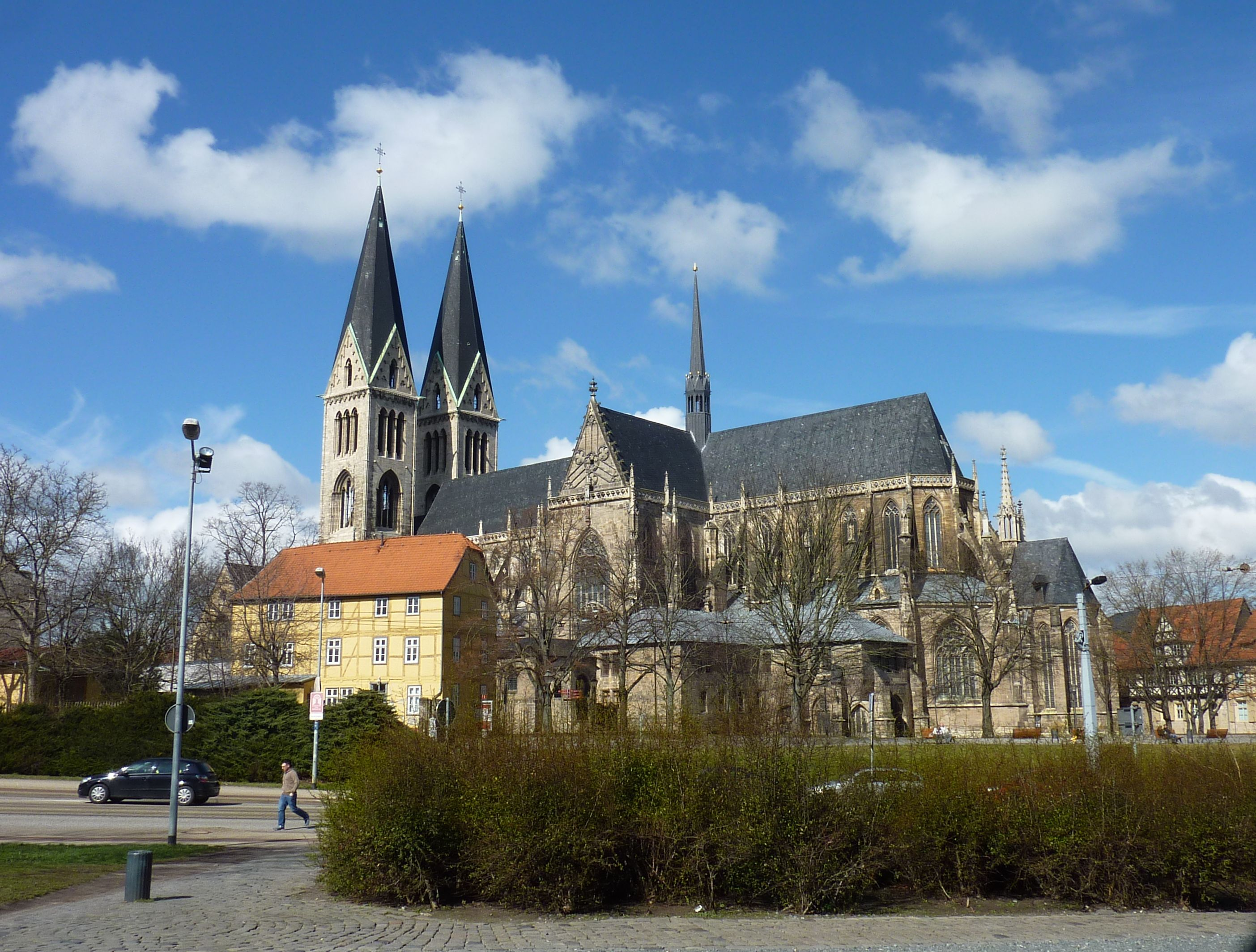 Halberstadt